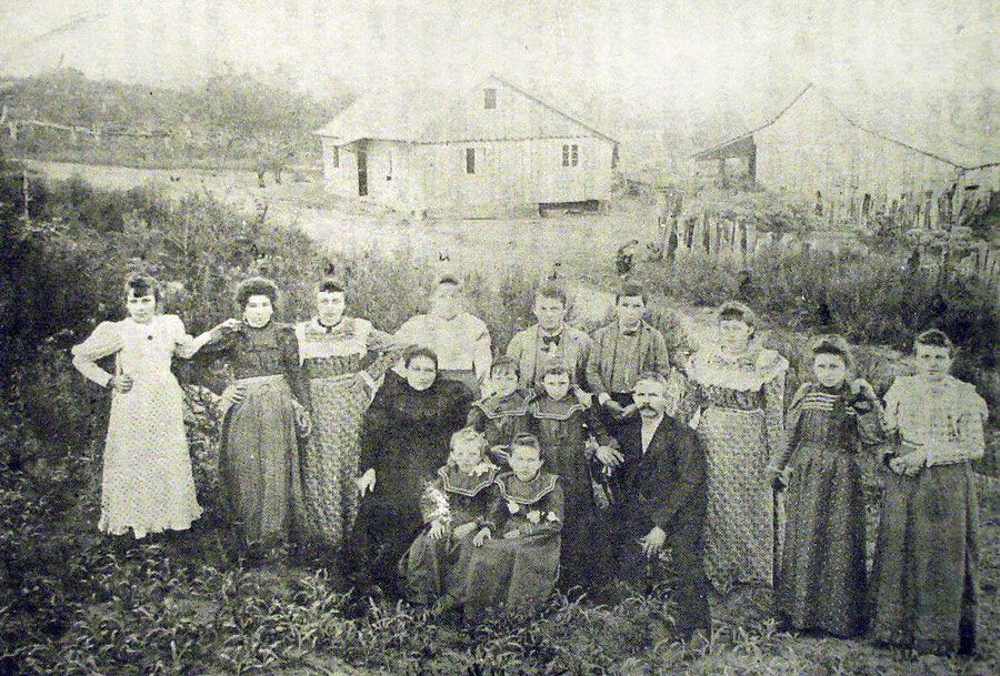 Familia Oppelt-Costamilan.